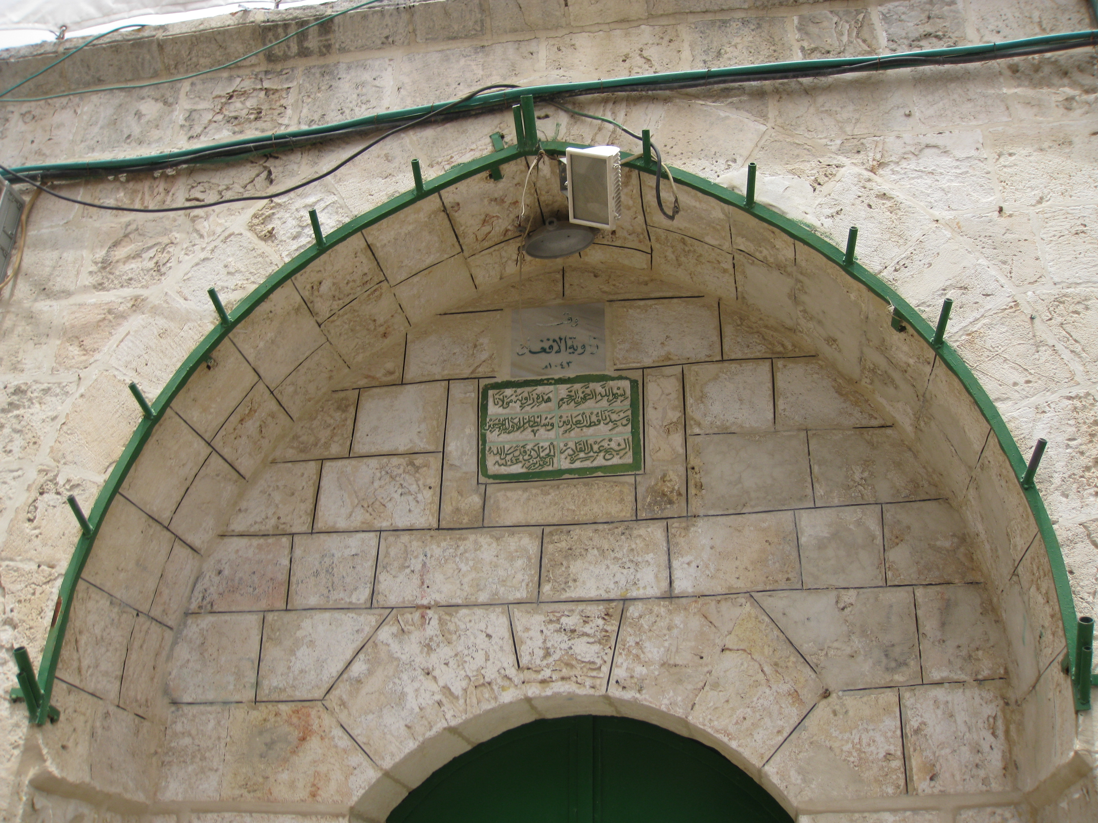 Muslim Quarter - Barquq Street הרובע המוסלמי בירושלים - רחוב ברקוק